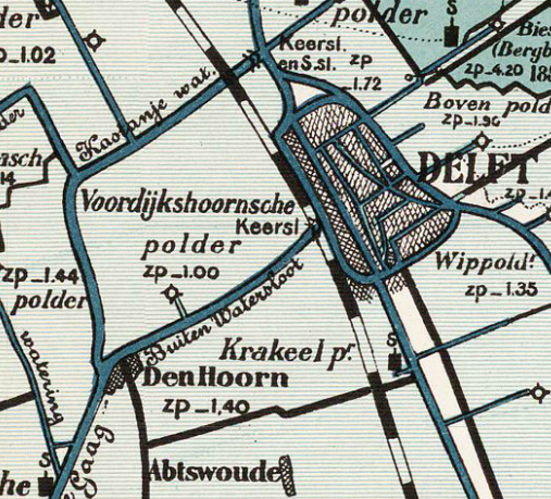 Voordijkshoornse_polder